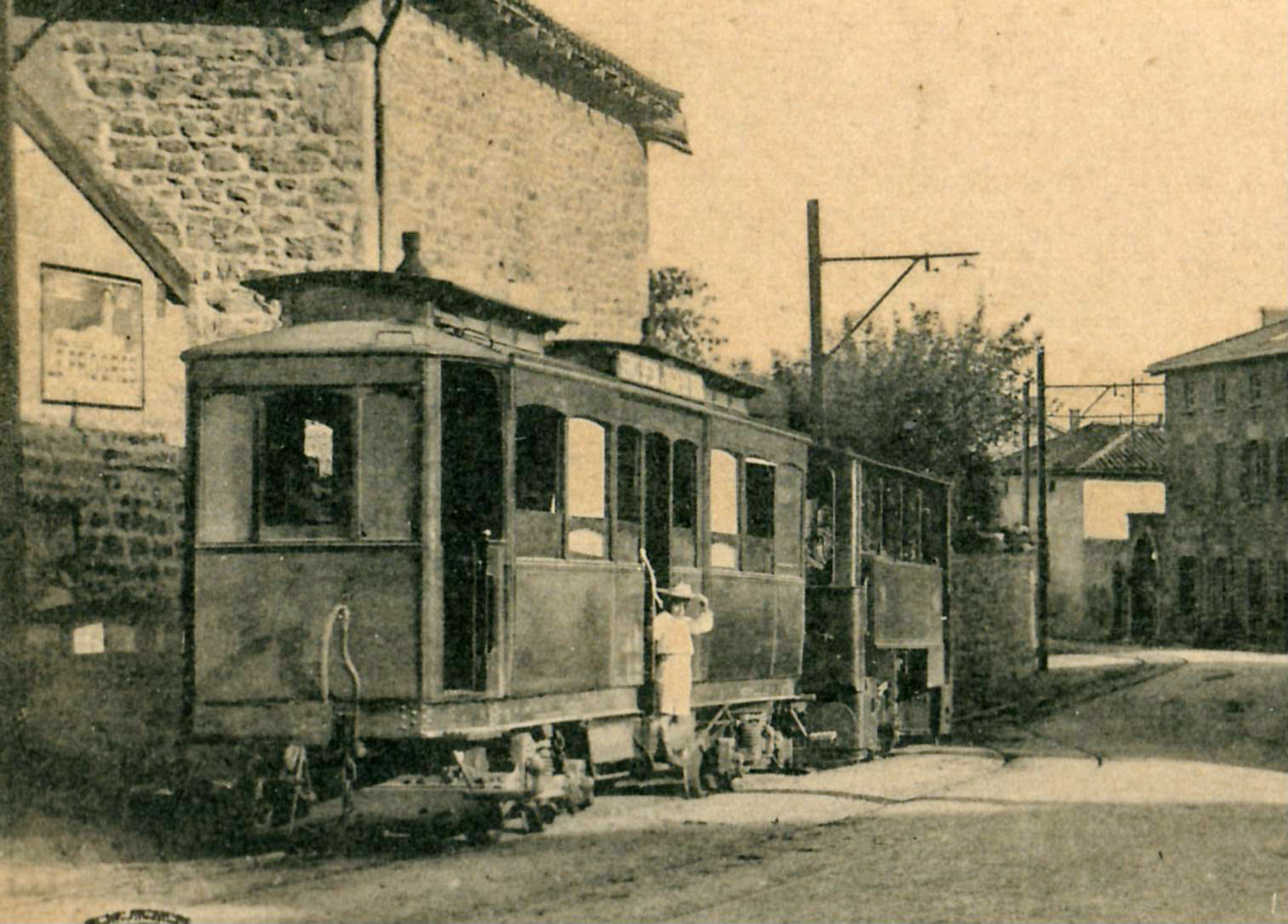 Détail de la carte postale ancienne éditée par S. Farges, édit. à Lyon, n°3069 VAUGNERAY - Terminus du Tramway Il s'agit d'une rame du Train de Vaugneray exploitée par le Fourvière Ouest-Lyonnais (FOL)